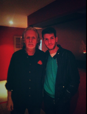 Luego de su fugaz vuelta a la musica, Posleman fue invitado a un concierto acustico que hizo Nito Mestre, en la provincia de San Juan.